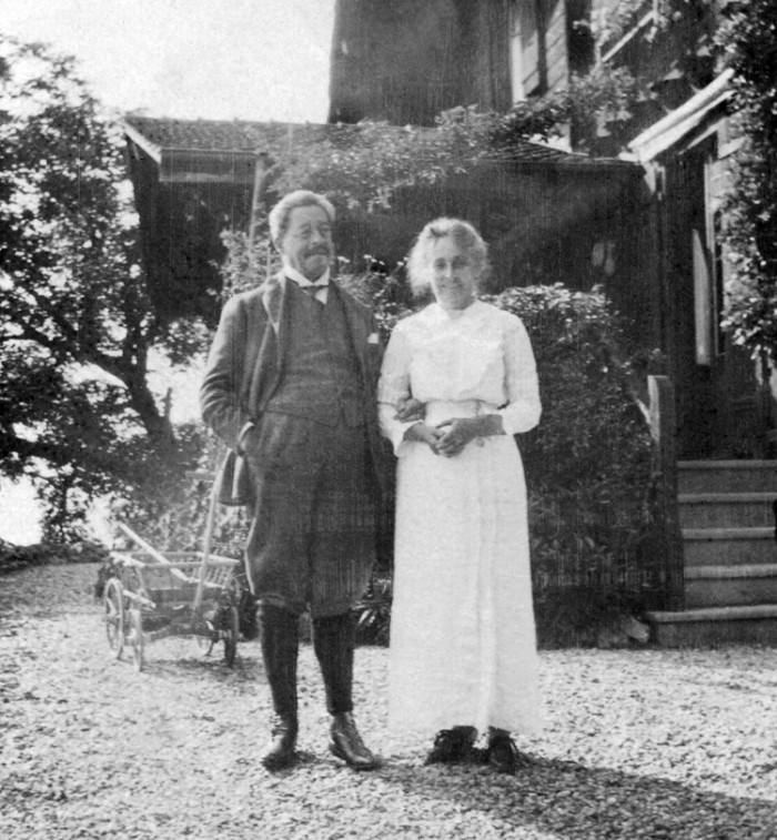 Arnold (Sam) Aletrino (1858-1916) met vrouw Emilie Julia (Jupie) van Stockum voor het chalet Chalet Georges-Maurice, Chernex, Montreux